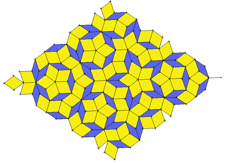 Pavage de Penrose avec losanges. Image personnelle.